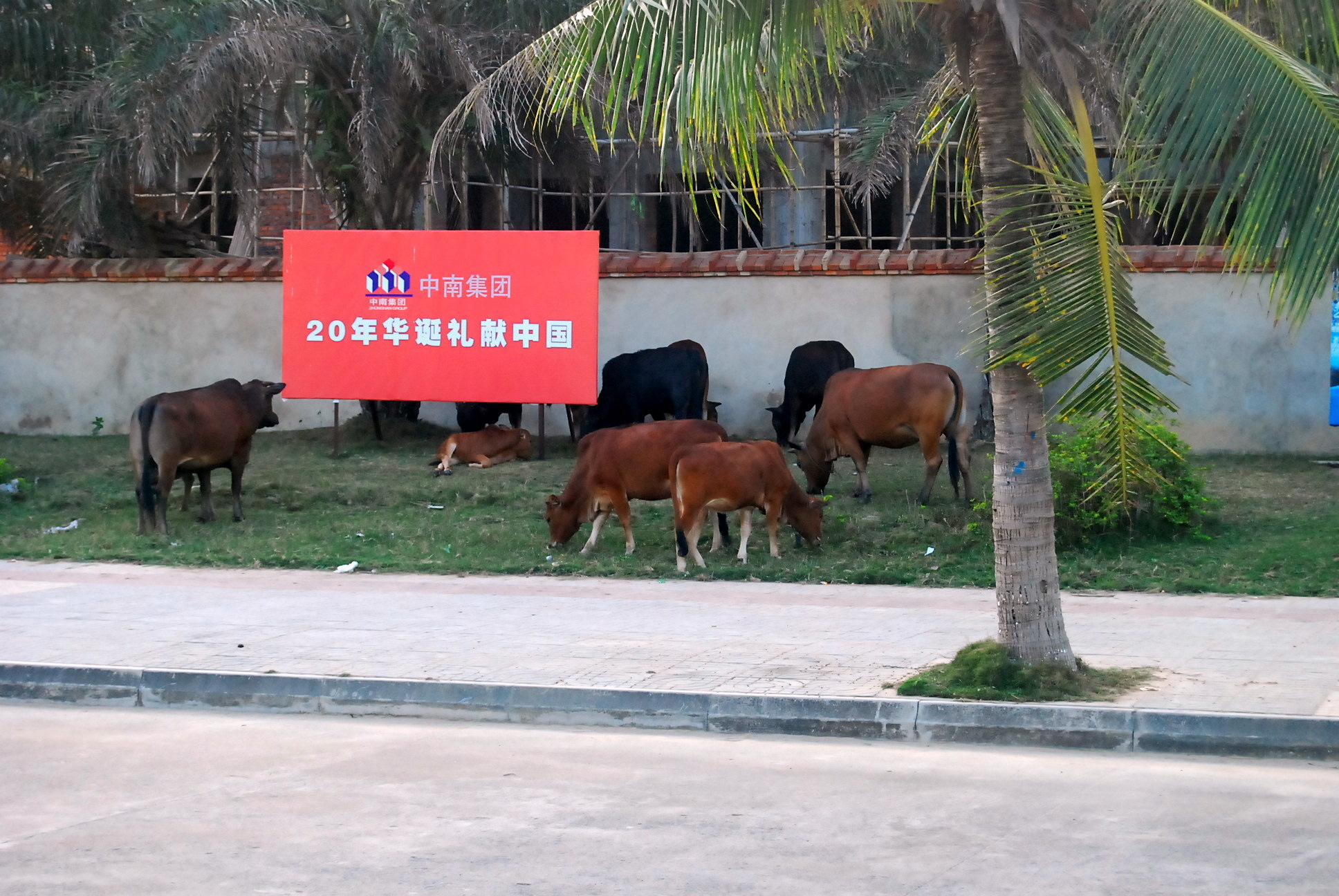 文昌街头的牛群